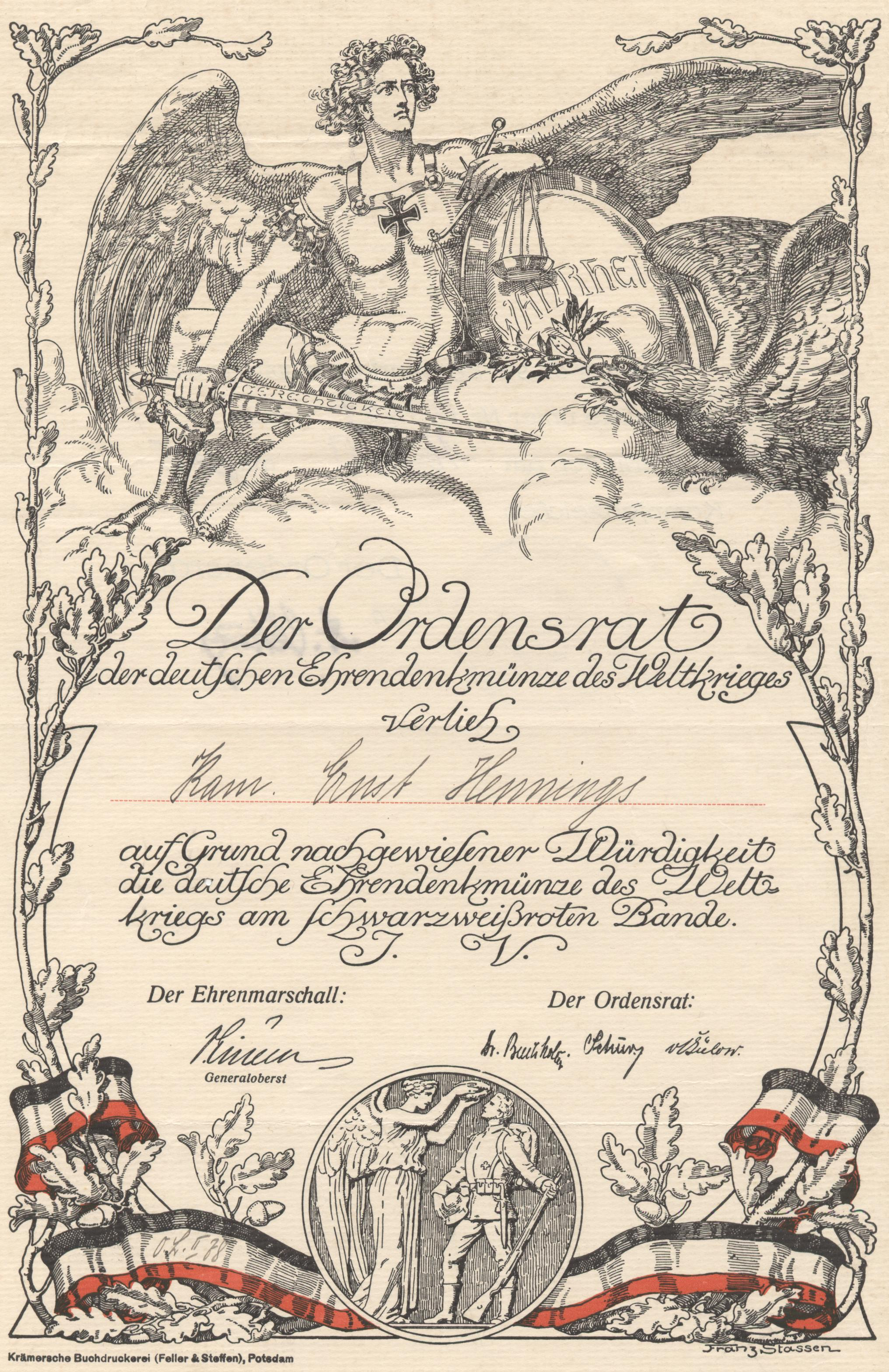 Urkunde über Verleihung ehrenhalber Deutsche Ehrendenkmünze des Weltkriegs (Deutsche Ehrenlegion).